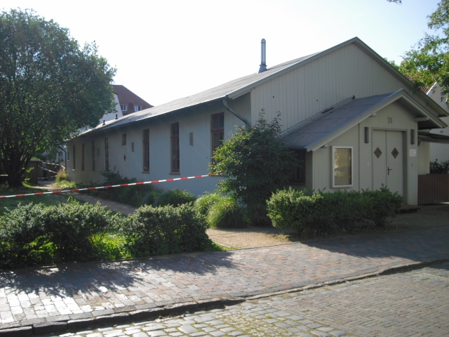 Ehemalige Isolierbaracke beim Evangelischen Krankenhaus Oldenburg in Oldenburg. Der von Architekt Heinrich Weber entwickelte Holzkonstruktion ist ein selten vorhandenes Beispiel für den um 1900 entstandenen mobilen Lazarettbau.